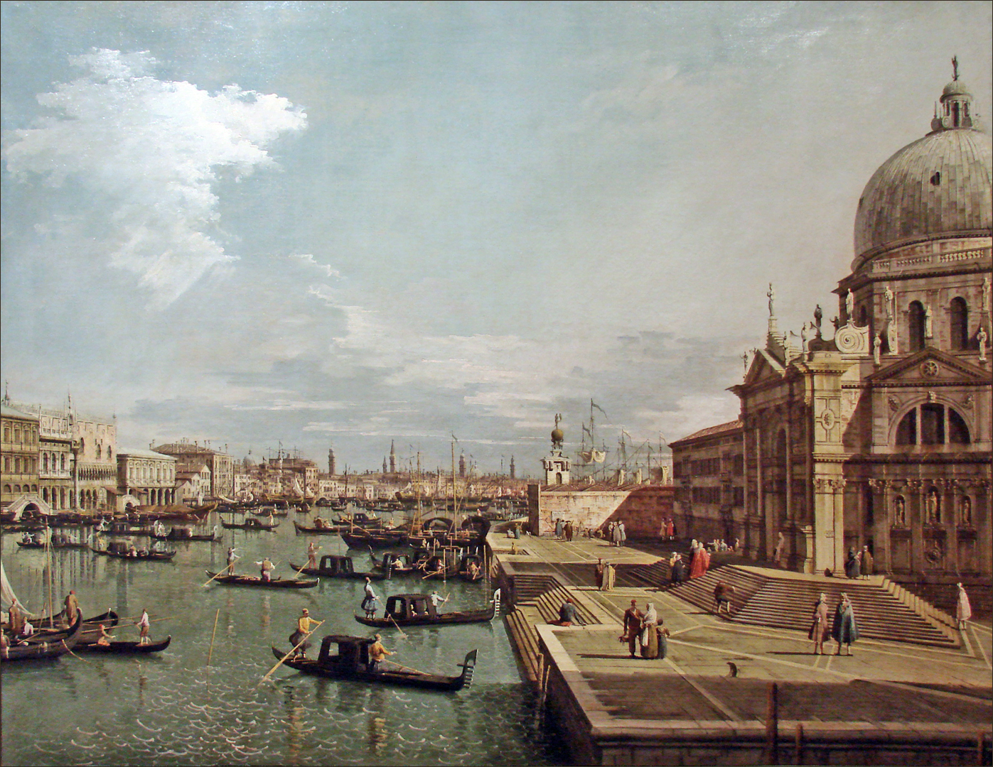 voir l'entrée de la fondation François Pinault (Punta della Dogana)